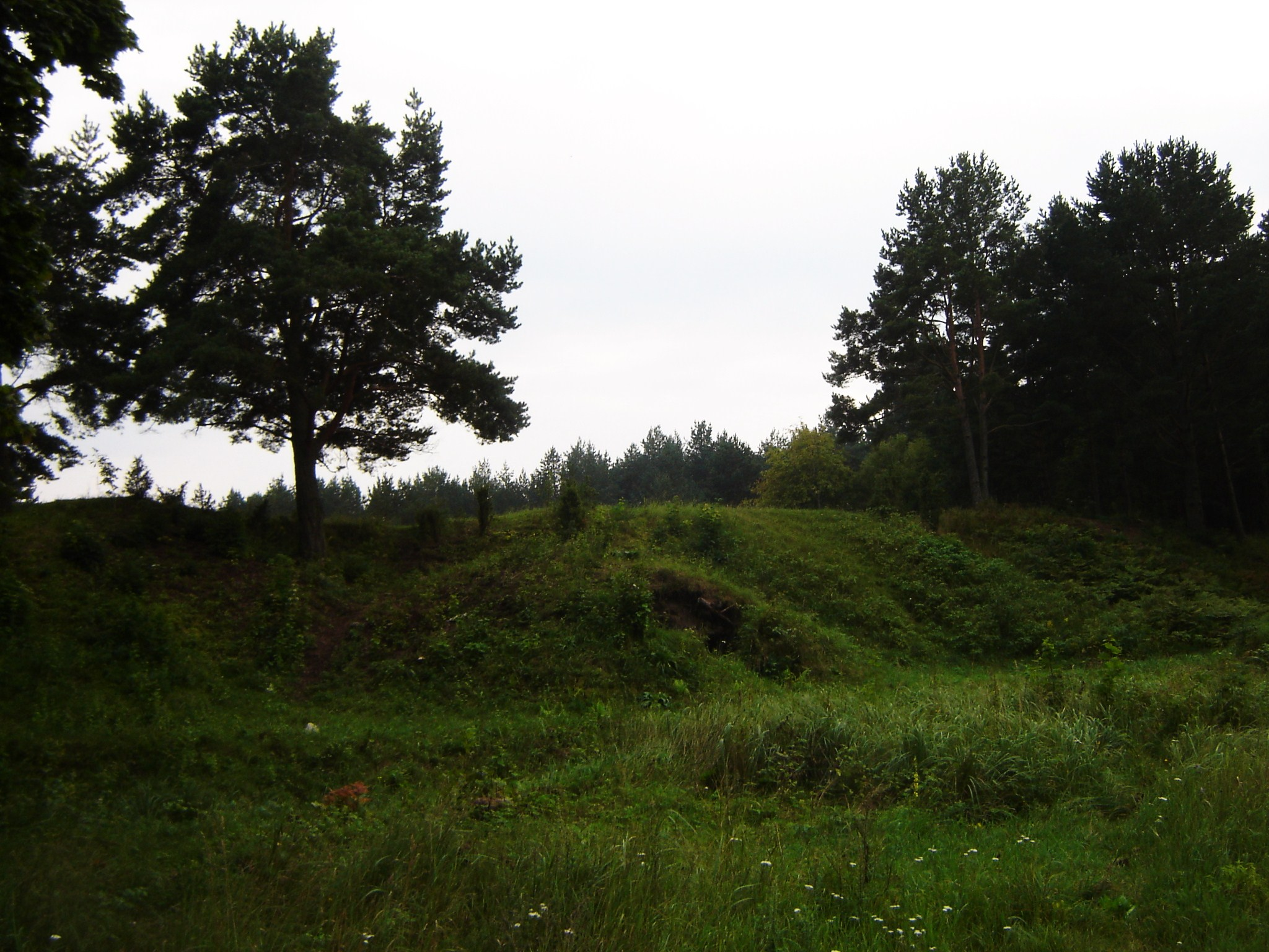 Jägala linnamägi